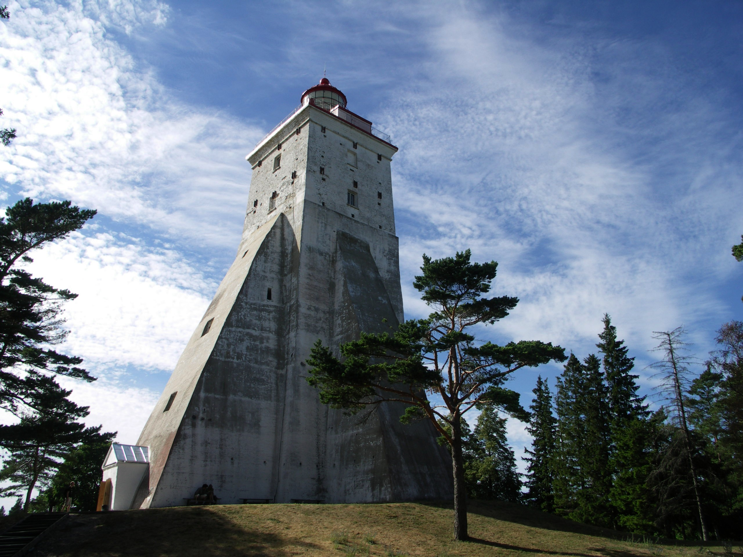 Kõpu tuletorn asub Hiiumaal Kõpu poolsaarel